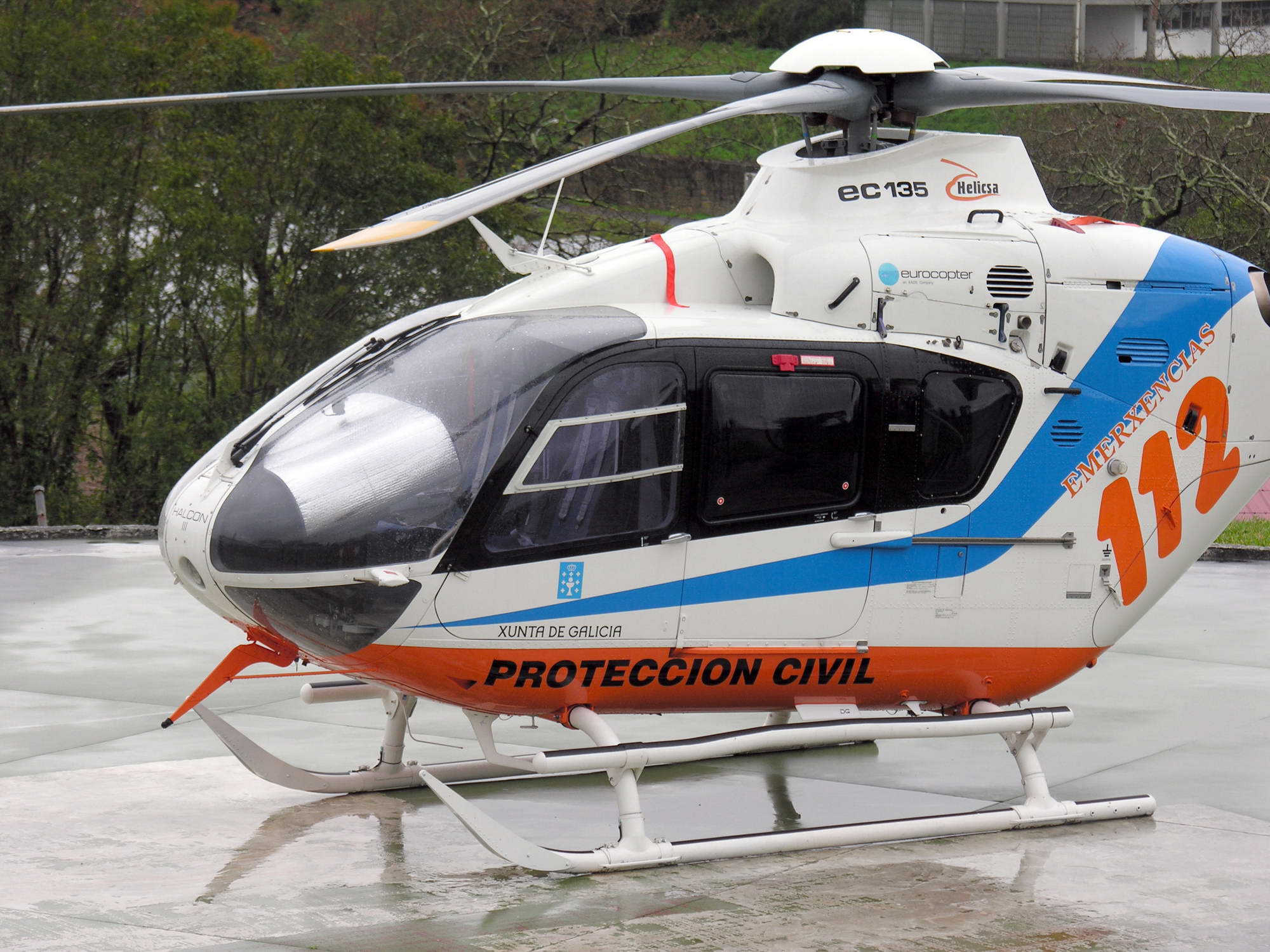 self made Conxo, Santiago de Compostela, Galicia, Spain